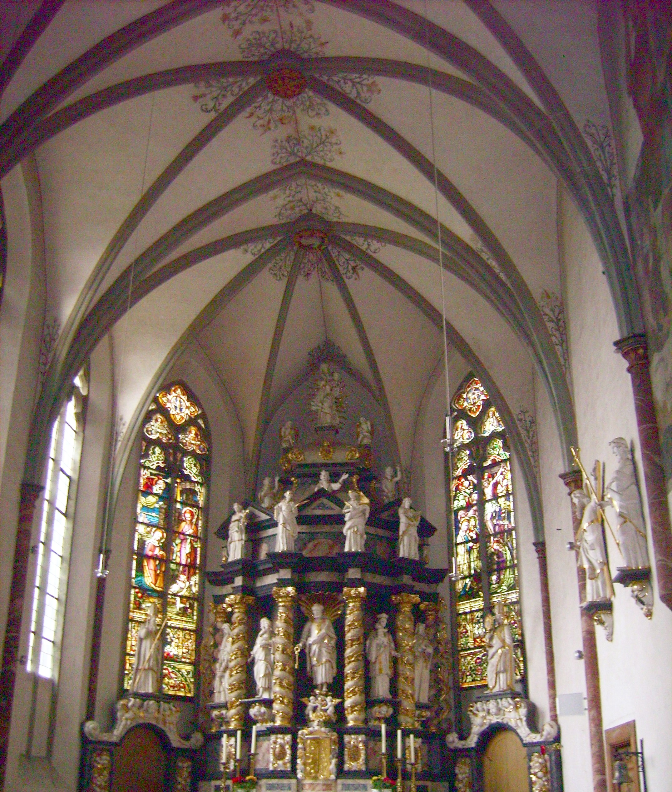 Kloster Oelinghausen - Hochaltar von Wilhelm Splithofen von 1712